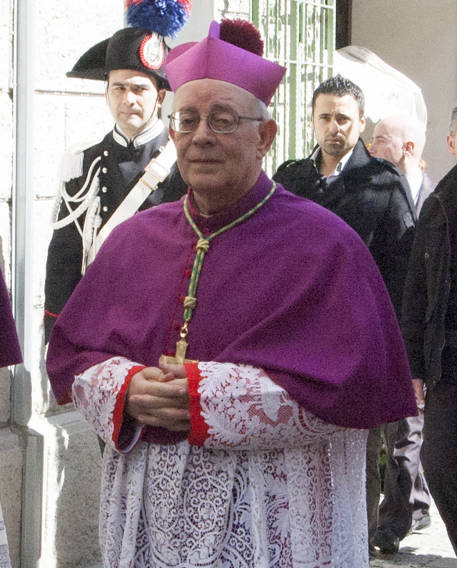 Monsignor Giovanni Paolo Zedda